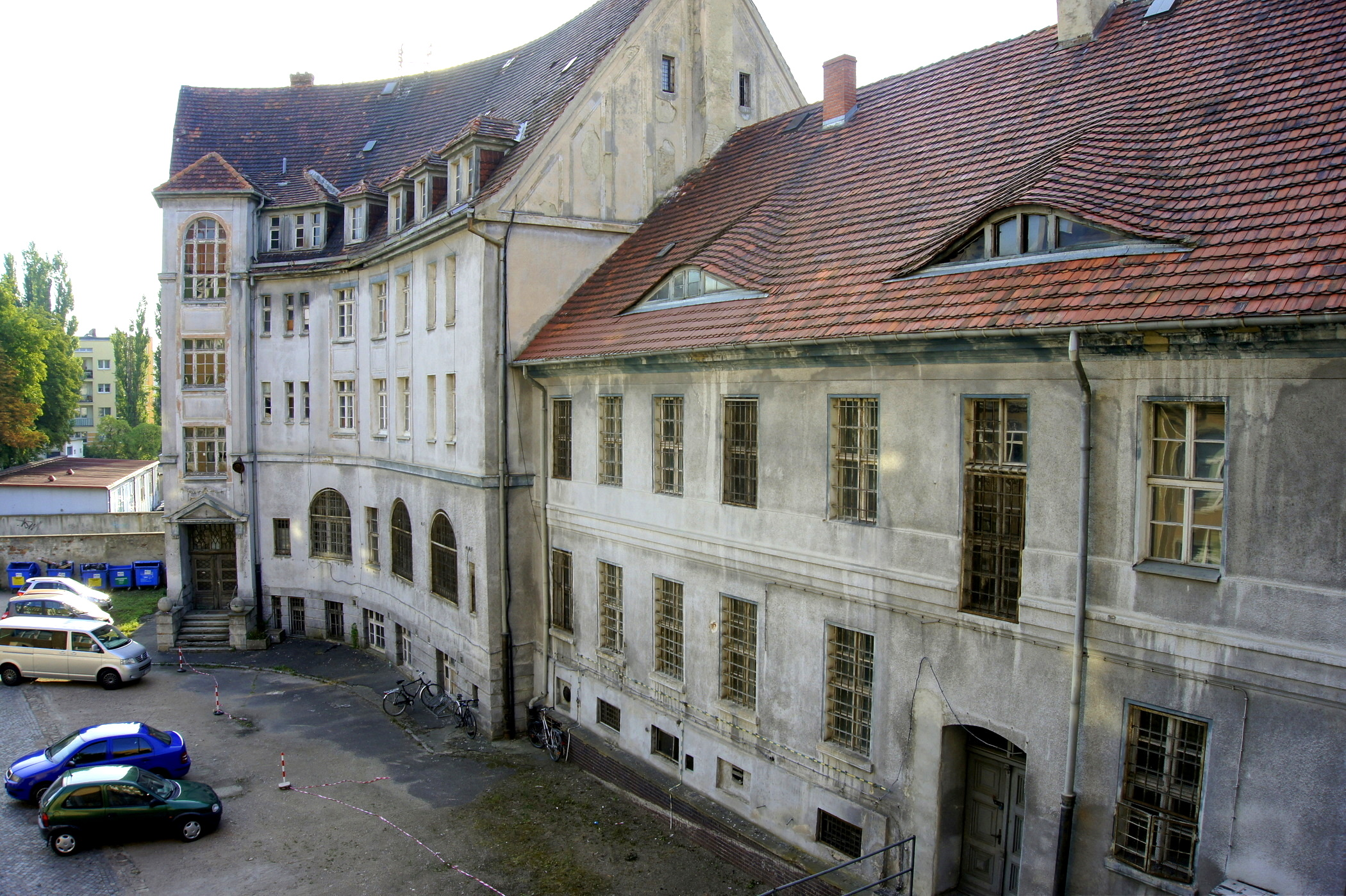 Gorzów Wlkp. Dziedziniec ratusza